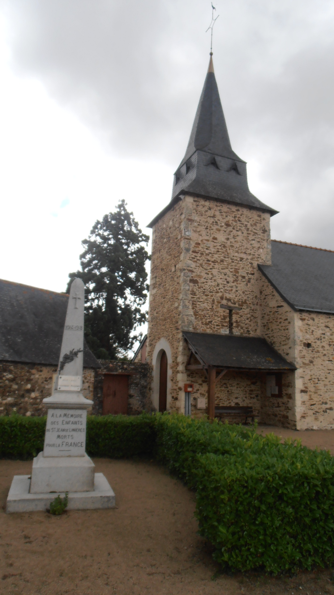 L'église du 12e siècle et le monument aux morts de Saint-Jean-de-Linières.